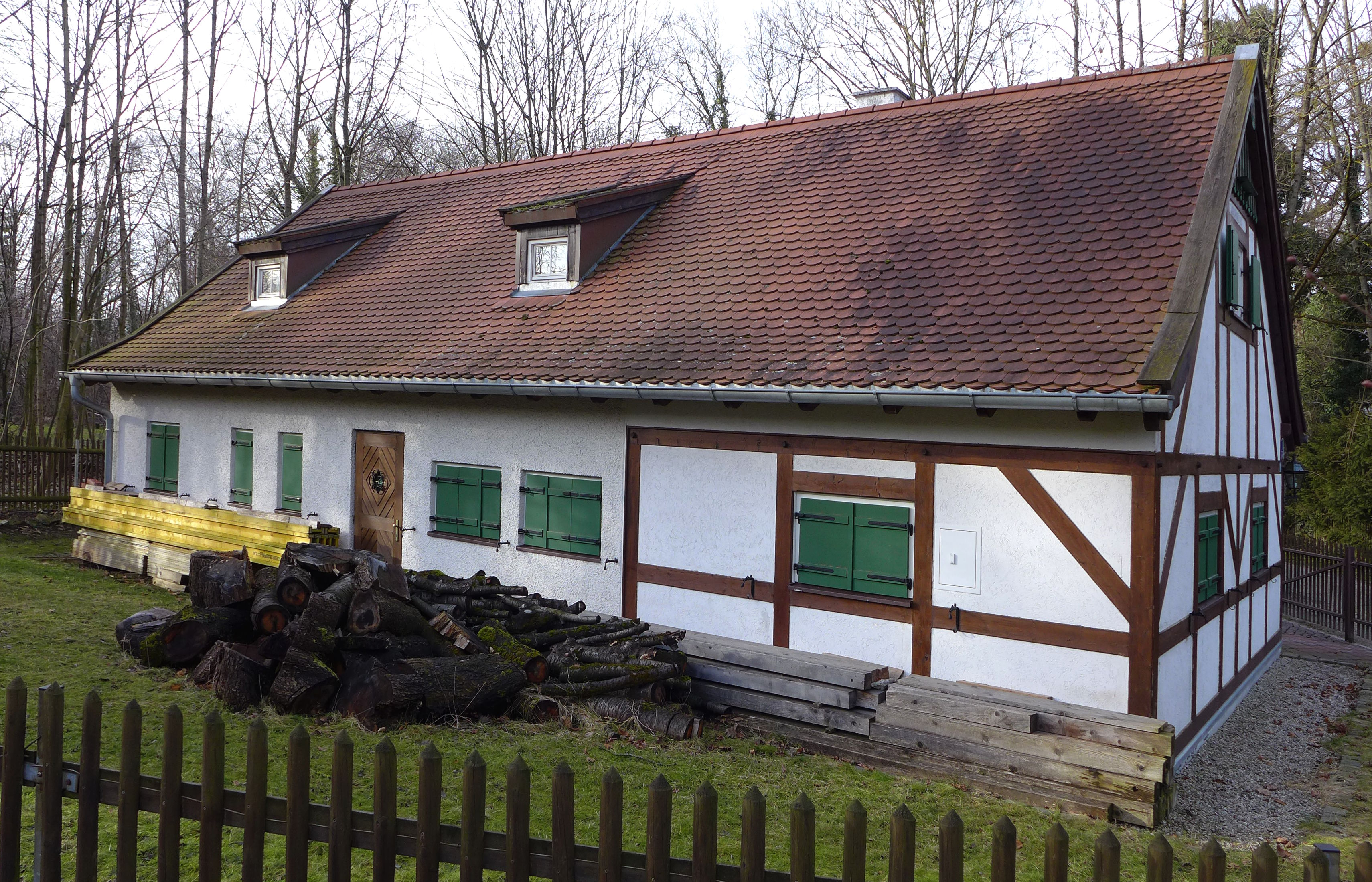 Carlhäusl Ostseite, An der Würm 1, München